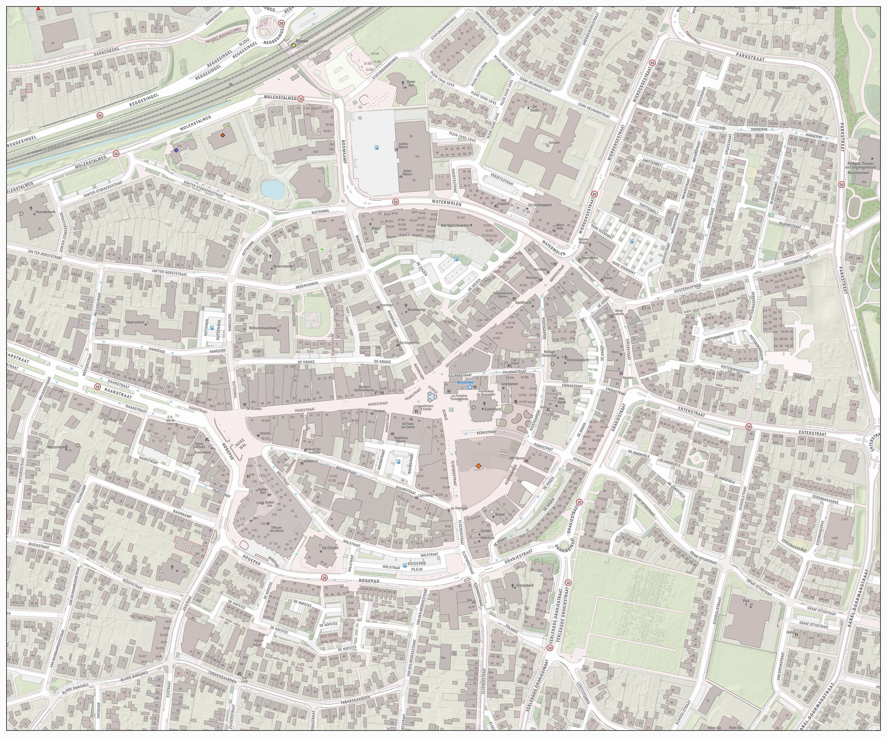 Topografische kaart van Rijssen (centrum van woonplaats). Resolutie: 2688 pixels/km. Kaartbeeld samengesteld uit de open geodata van de Basisregistratie Grootschalige Topografie (BGT), Creative Commons-BY Kadaster, en Top10NL en Top25namen (Basisregistratie Topografie, Kadaster), Creative Commons-BY Kadaster. Gebouwvlakken uit open geodata BAG extract, Creative Commons-BY Kadaster. Wegen uit de OpenStreetMap, CC-BY OpenStreetMap bijdragers. Reliëfschaduw uit de Actuele Hoogtekaart AHN2/AHN3. Samenstelling en kleurenschema: Jan-Willem van Aalst, met QGIS2. Zie ook de Legenda.